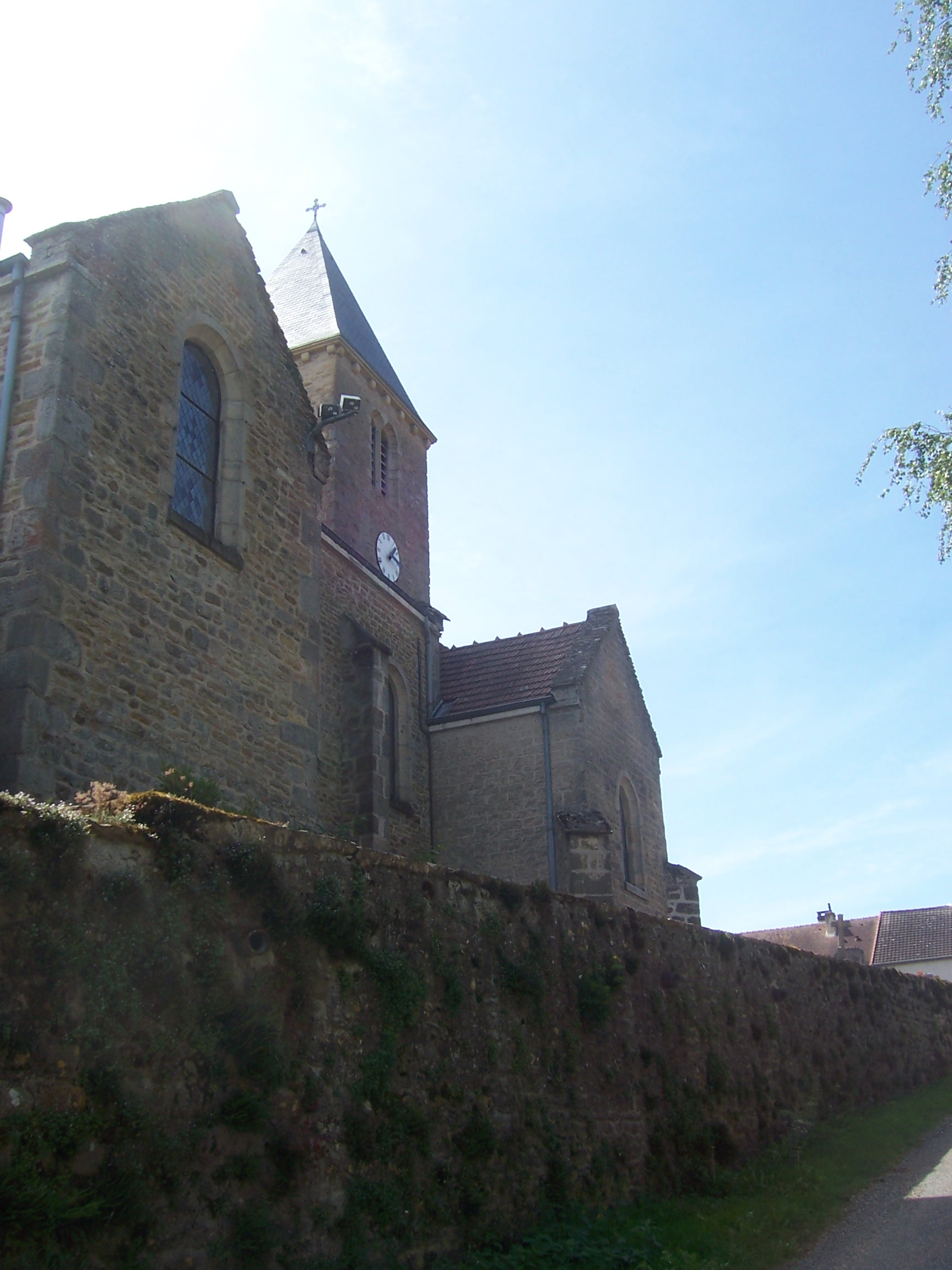 Eglise de Sailly